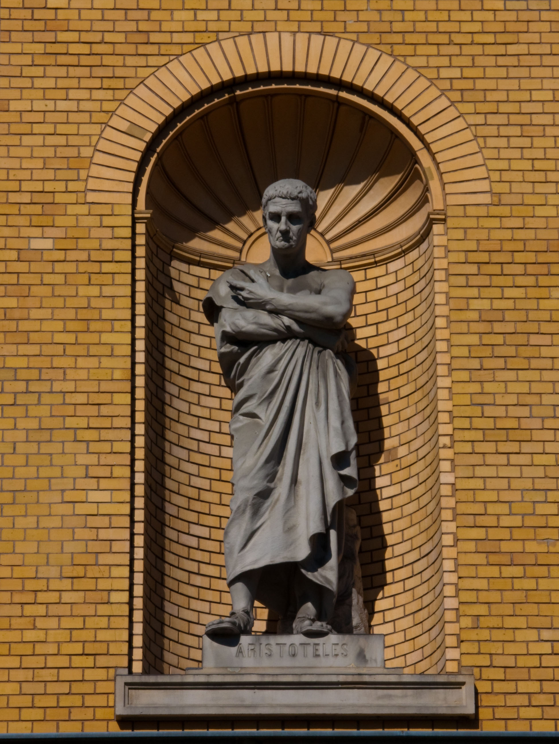 Berlin - Nischenfigur Aristoteles am Joachimsthalschen Gymnasium von Max Klein